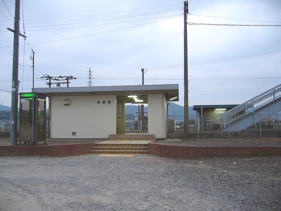 長森駅